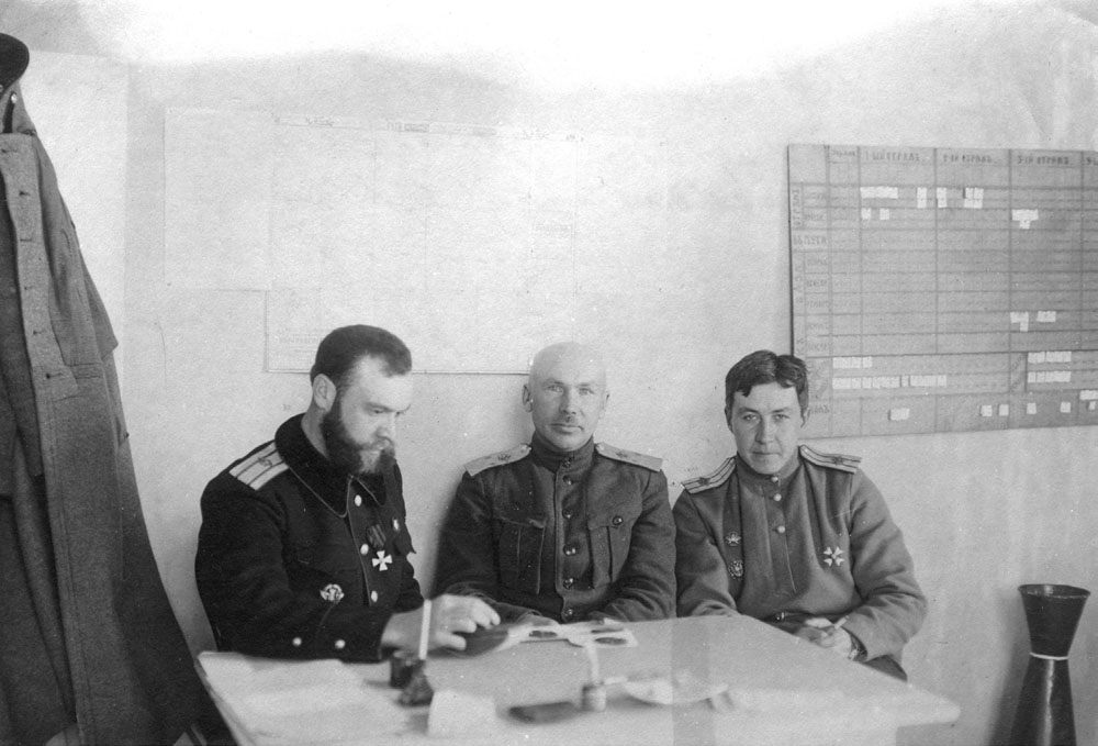 Инспектор авиации ВСЮР генерал-лейтенант И.И. Кравцевич (в центре) в штабе Донской авиации. Слева — И.И. Стрельников, справа — Вячеслав Григорьевич Баранов. 1919